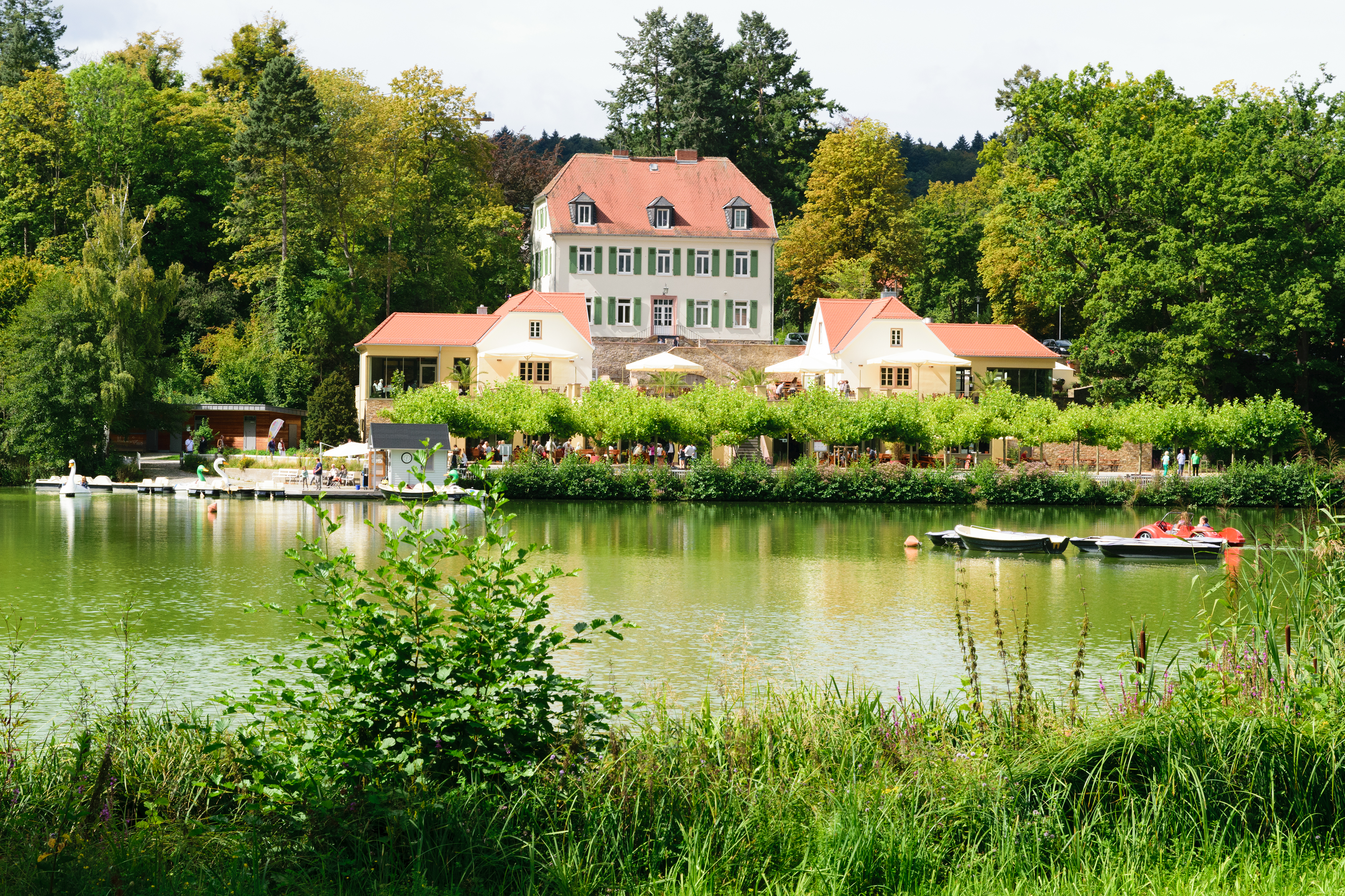 "Teichhaus" am Großen See im Bad Nauheimer Kurpark